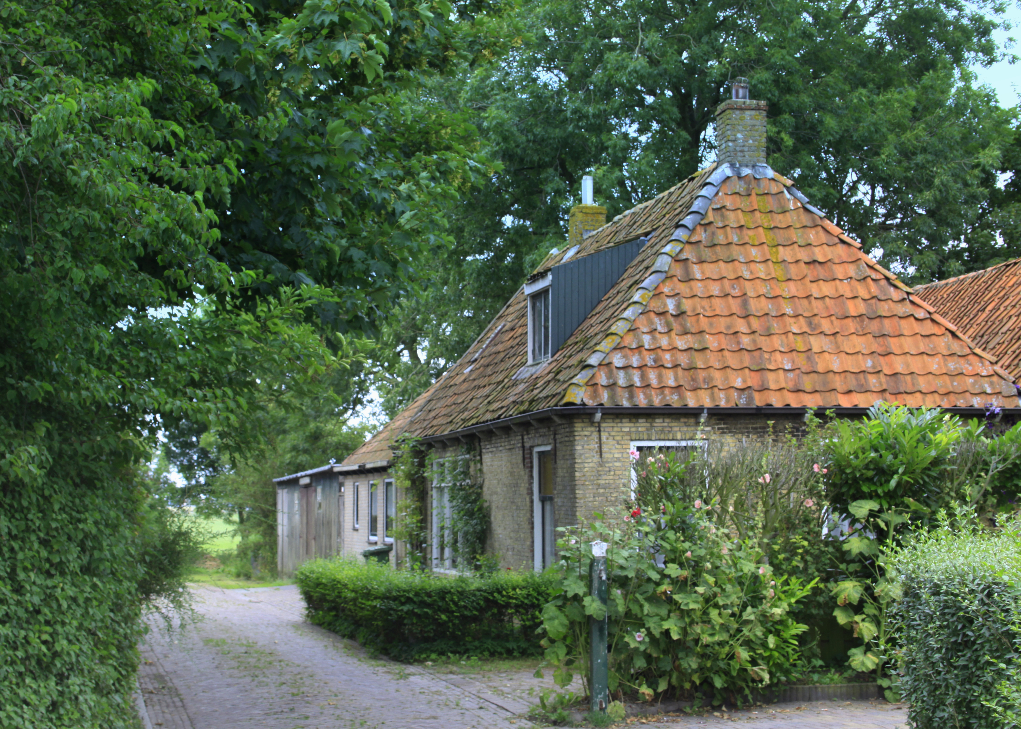 Ook dit mooie plaatje hoort bij het beschermde dorpsgezicht van Piaam.